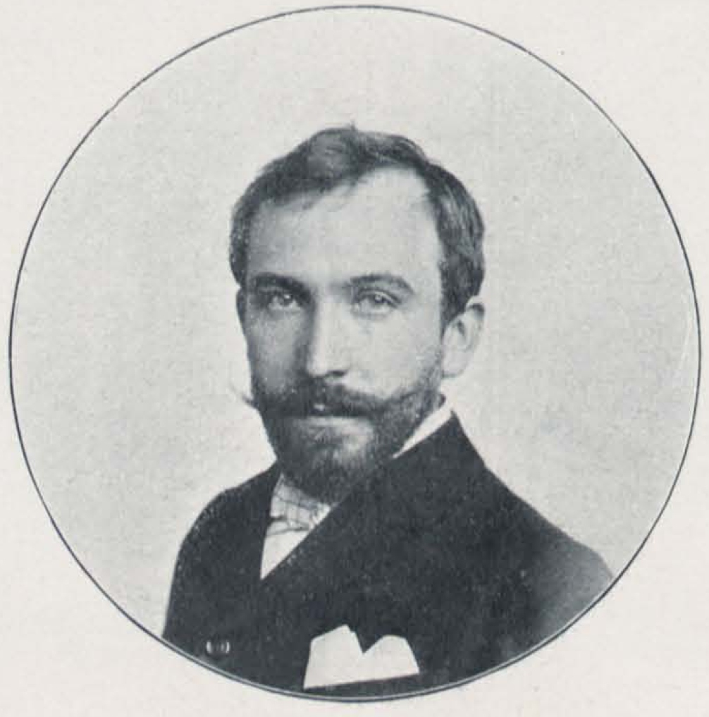 Hans Latt, deutscher Bildhauer. (Aufgenommen 1899).